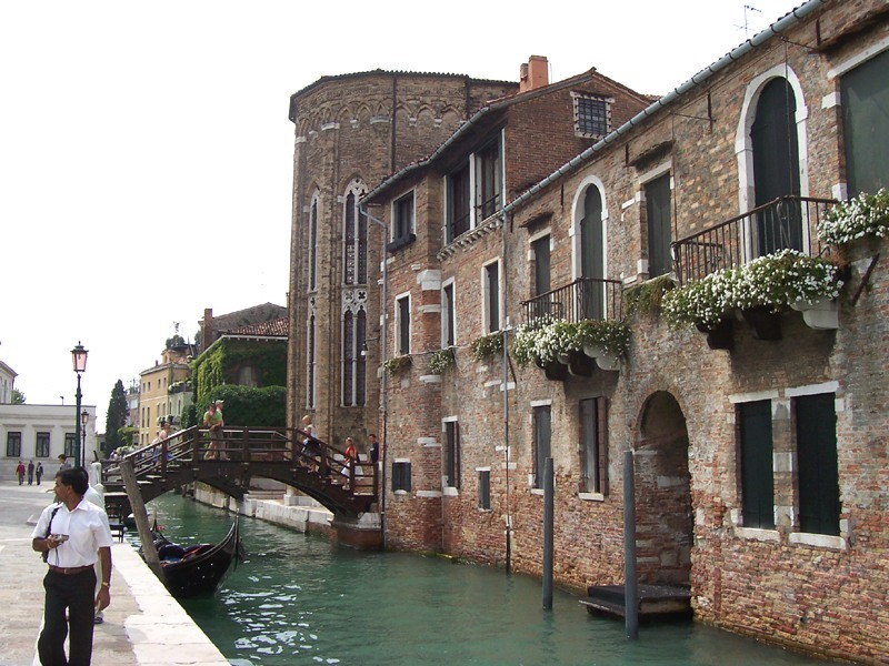 Venezia - Rio S. Gregorio. Facciata dell'Abbazia di San Gregorio rivolta verso la Salute.